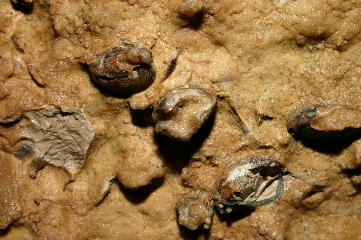 Binghöhle bei Streitberg